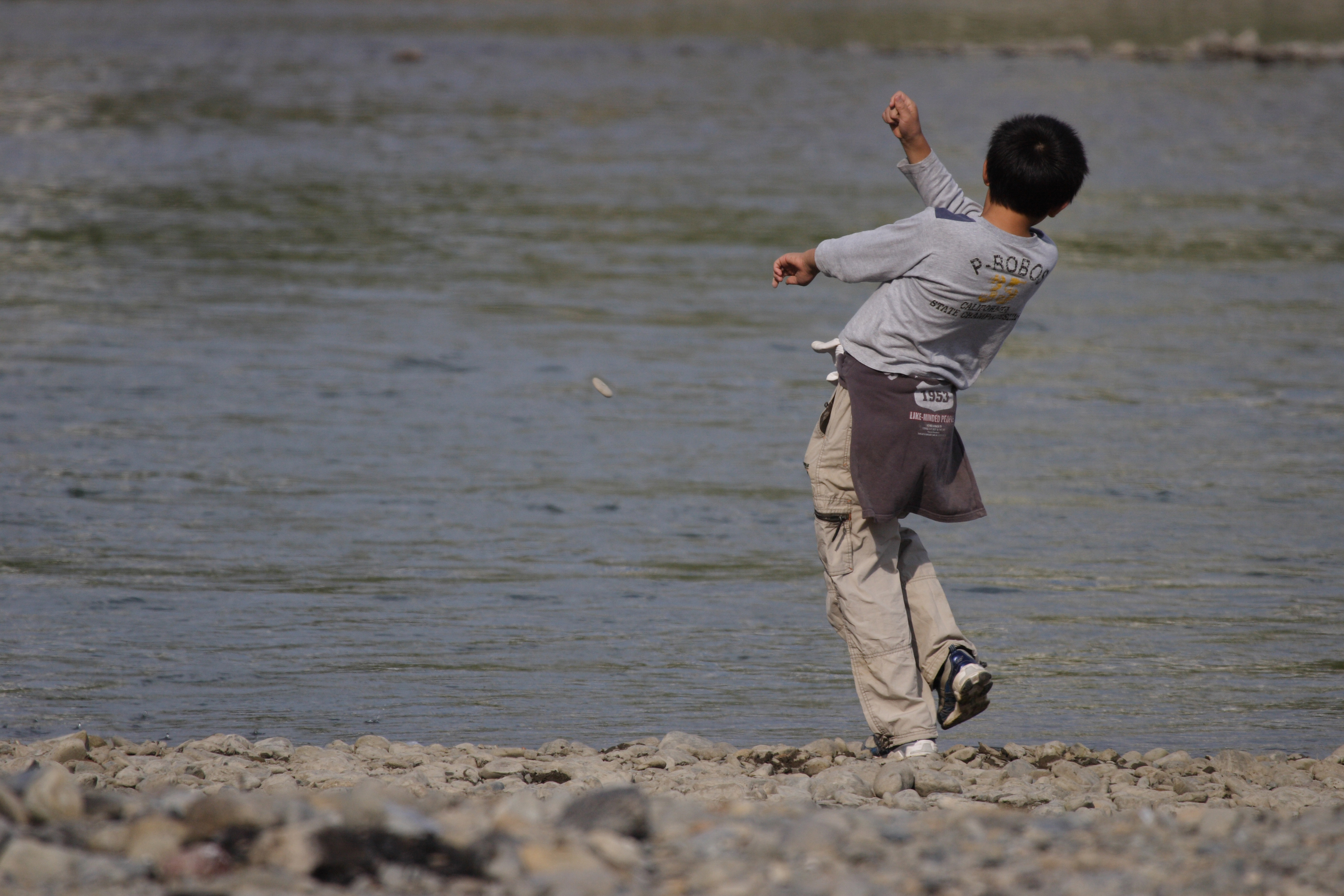 [MAP]